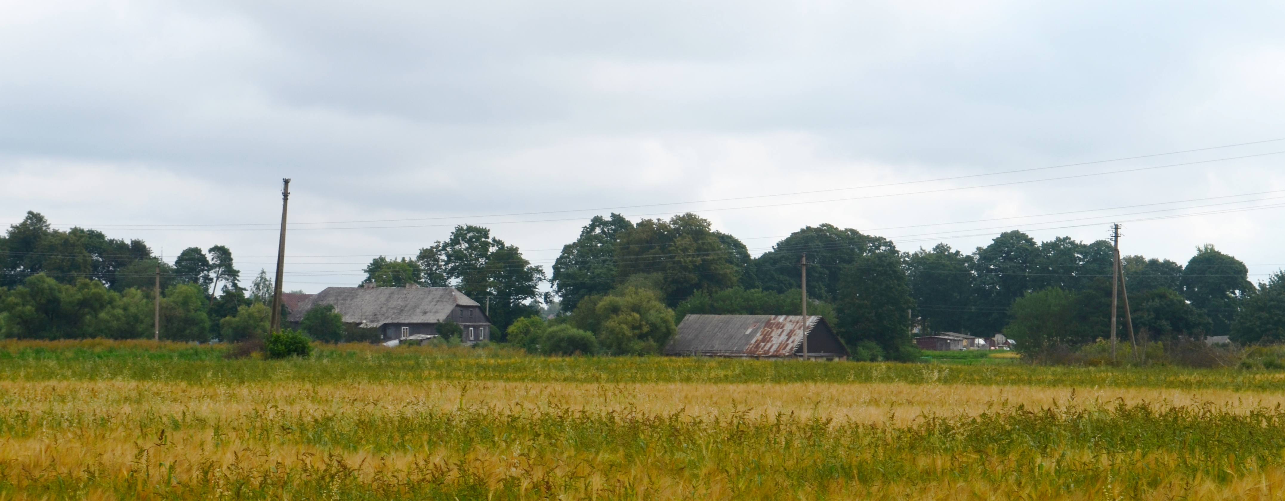 Palankesiai, Jonavos raj.